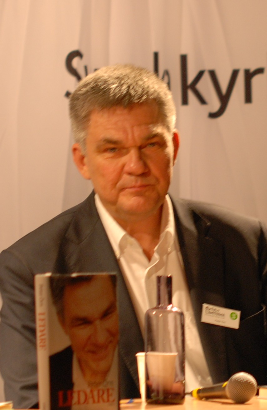 Peter Örn